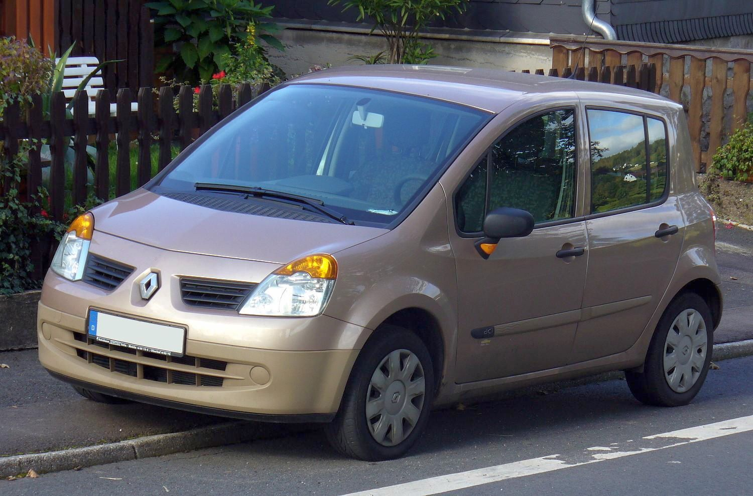 Renault Modus